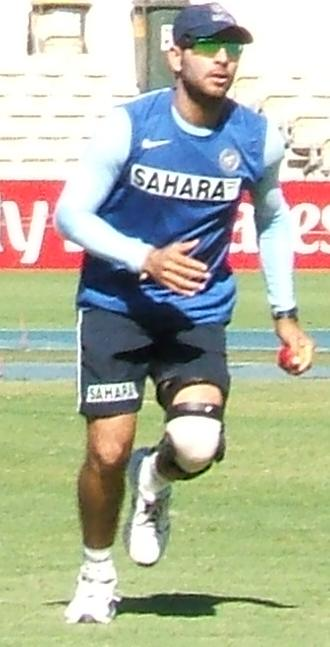 Yuvraj Singh fielding at Adelaide Oval